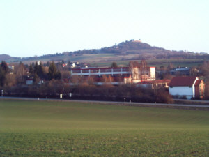 Otzbergschule, im Hintergrund die Veste Otzberg.